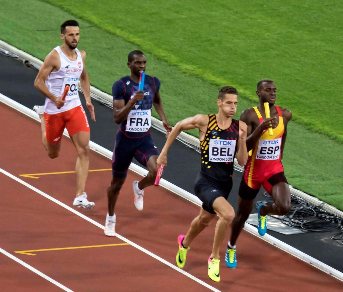 d9_18 finale 4x400m team belgium